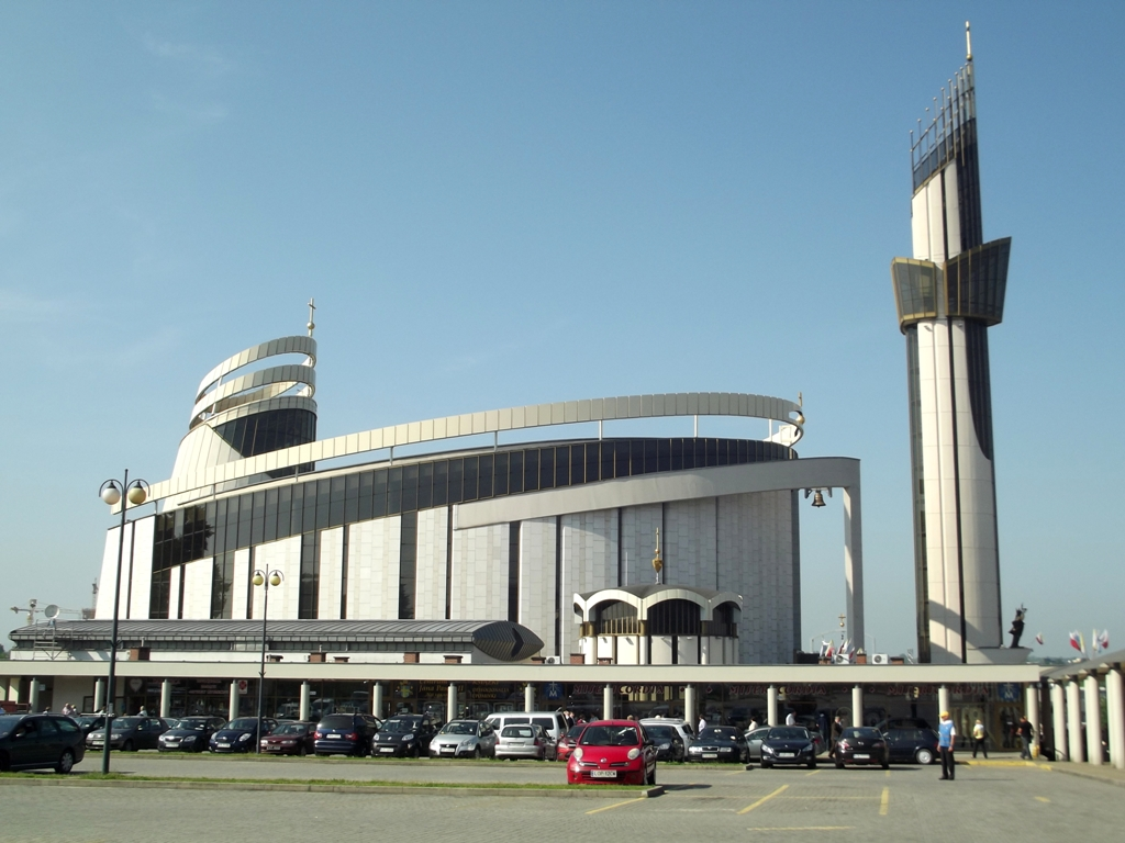 Zdjęcie zrobione podczas uroczystości beatyfikacji Zofii Czerskiej i Małgorzaty Szewczyk, w Sanktuarium Bożego Miłosierdzia w Łagiewnikach.